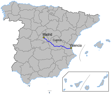 Mapa de la autovía a3